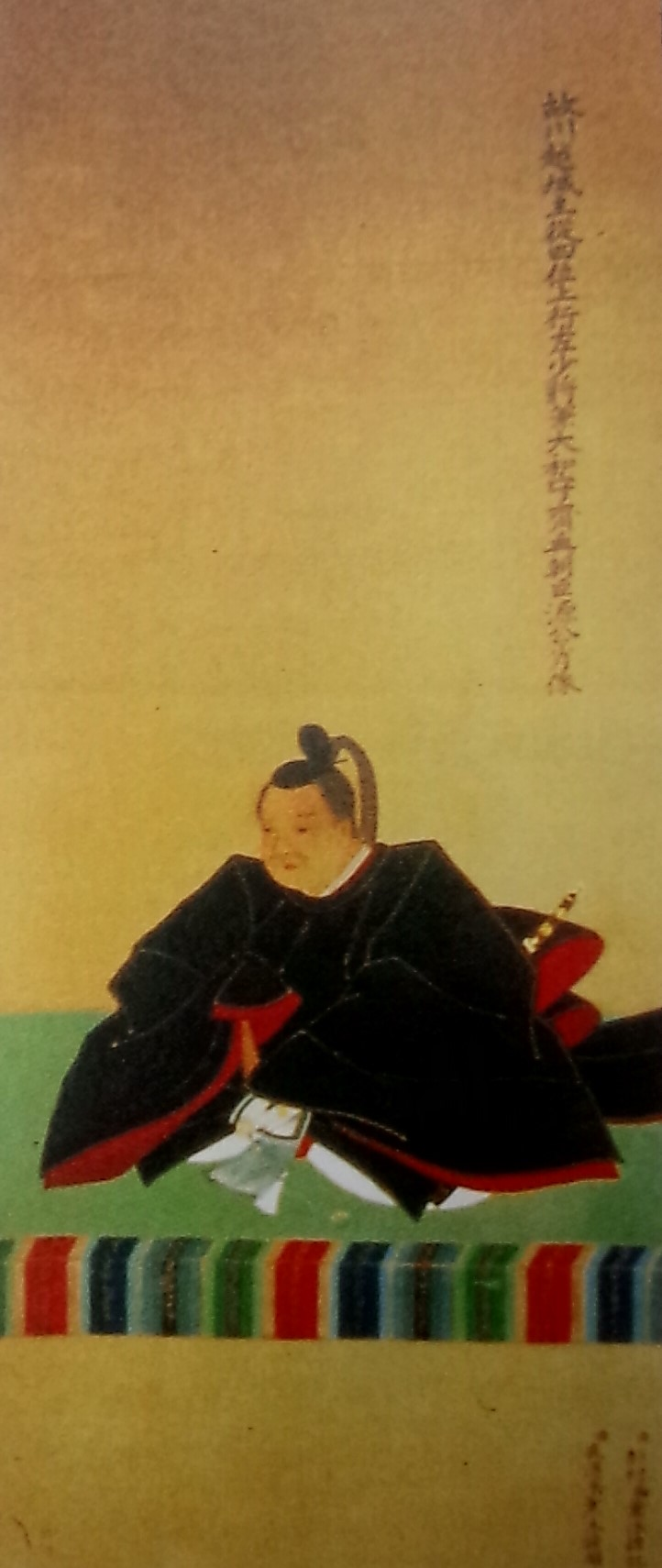 松平斉典の肖像。